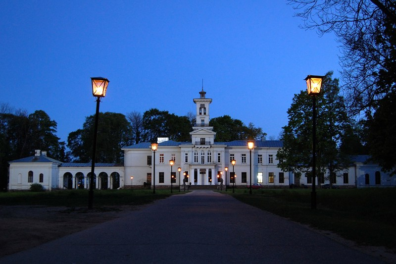 Astravo dvaras. Astravo dvaras vakare.